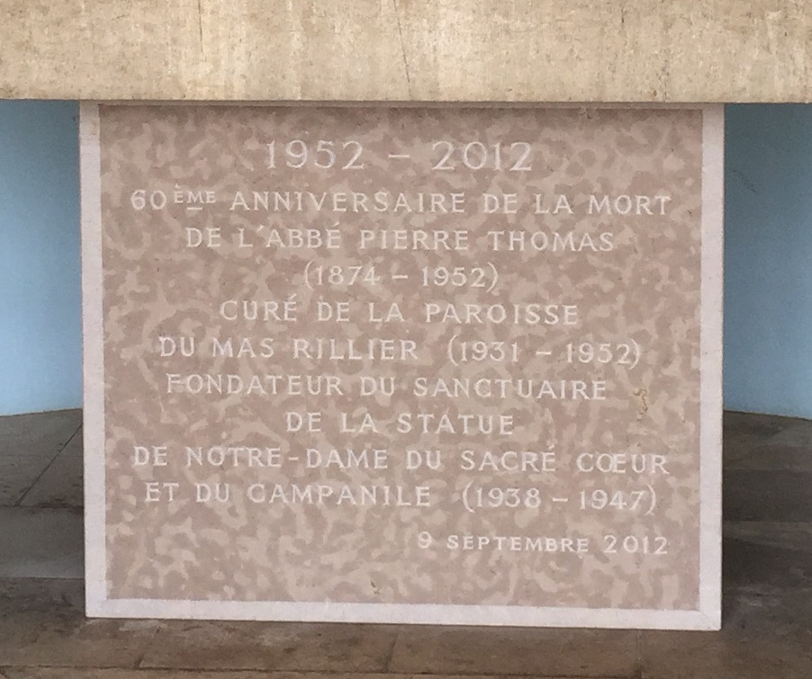 Plaque à l'intérieur de Notre-Dame du Sacré-Coeur (La Madone, La Vierge du Mas Rillier), évoquant l'abbé Thomas, la Madone et le Campanile tout proche.